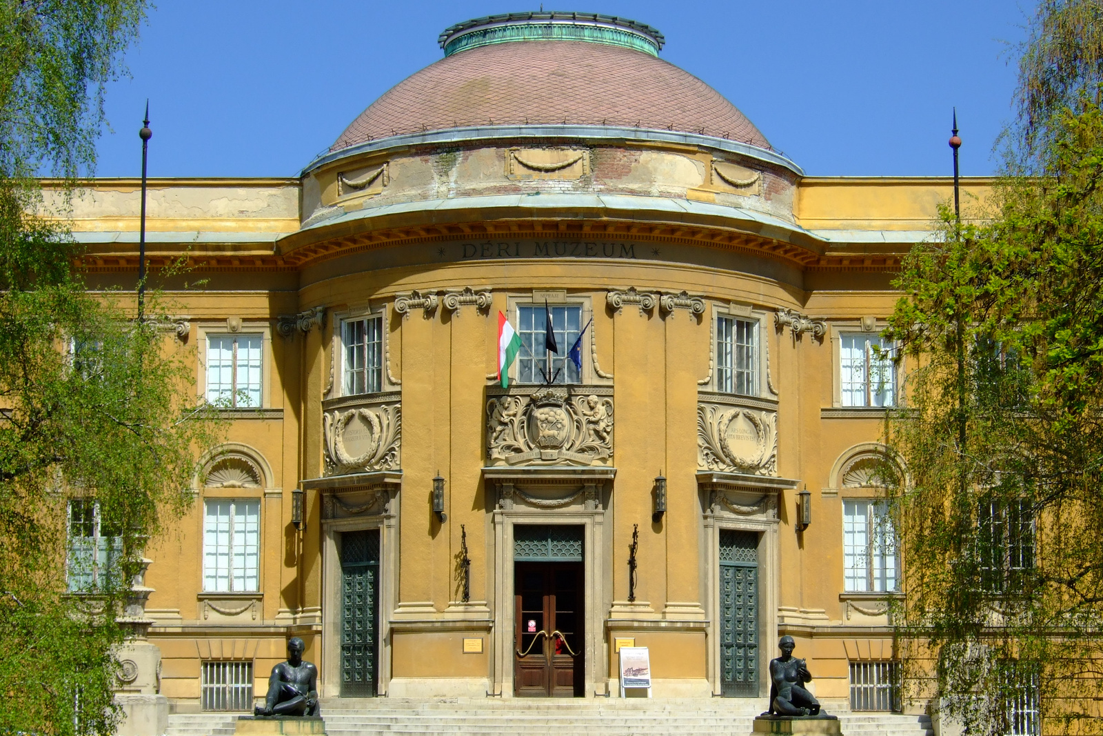 Déri Múzeum (Debrecen, Déri tér) This is a photo of a monument in Hungary. Identifier: 5226